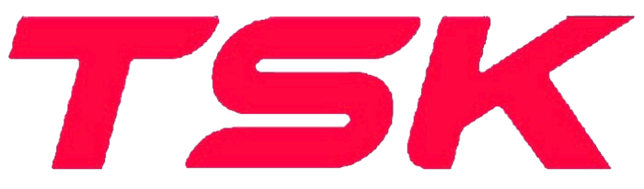 さんいん中央テレビロゴマーク(2020/4/1〜)